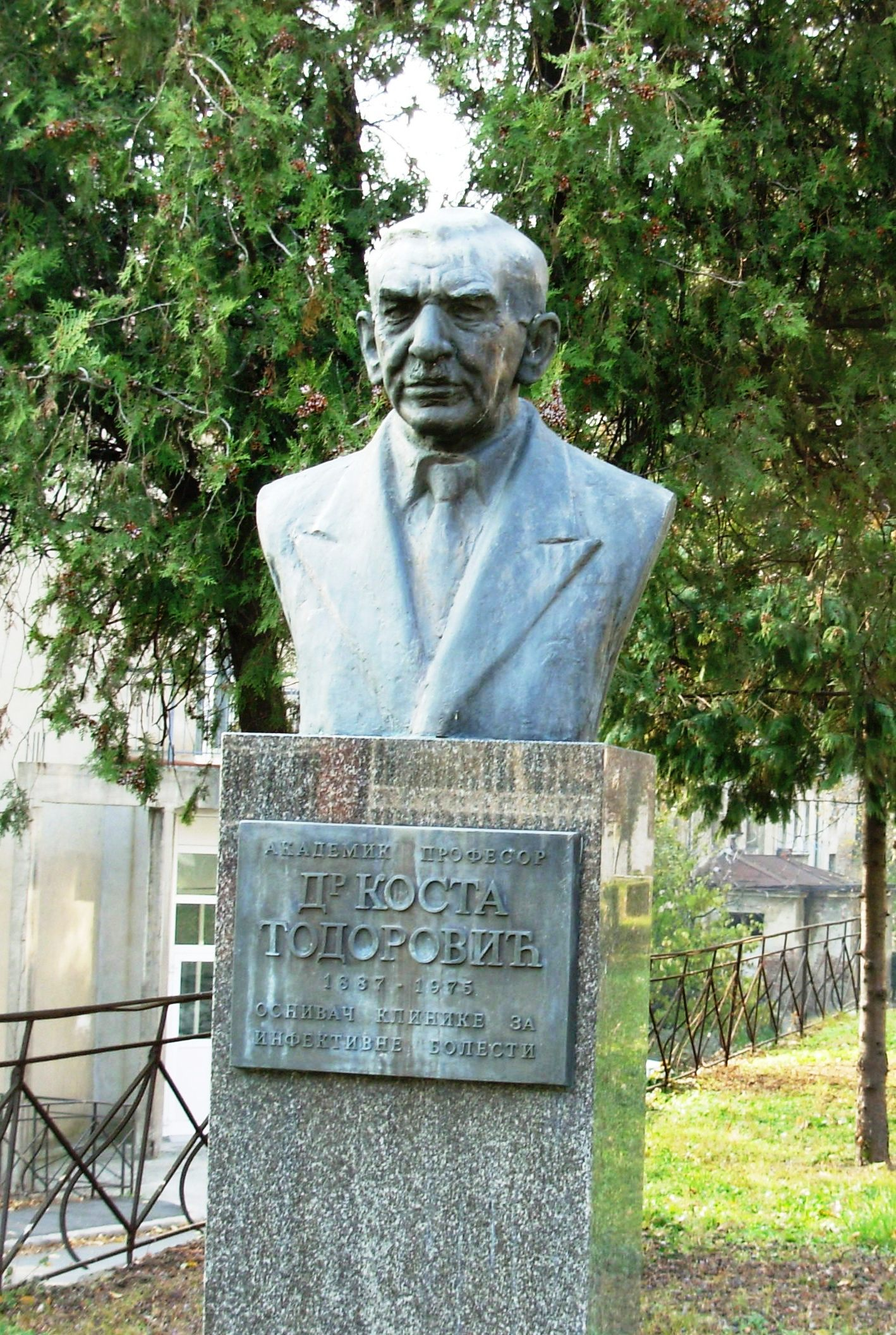 Spomenik dr Kosti Todoroviću, akademiku i infektologu u krugu Kliničkog centa Beograd. Slikao Goldfinger